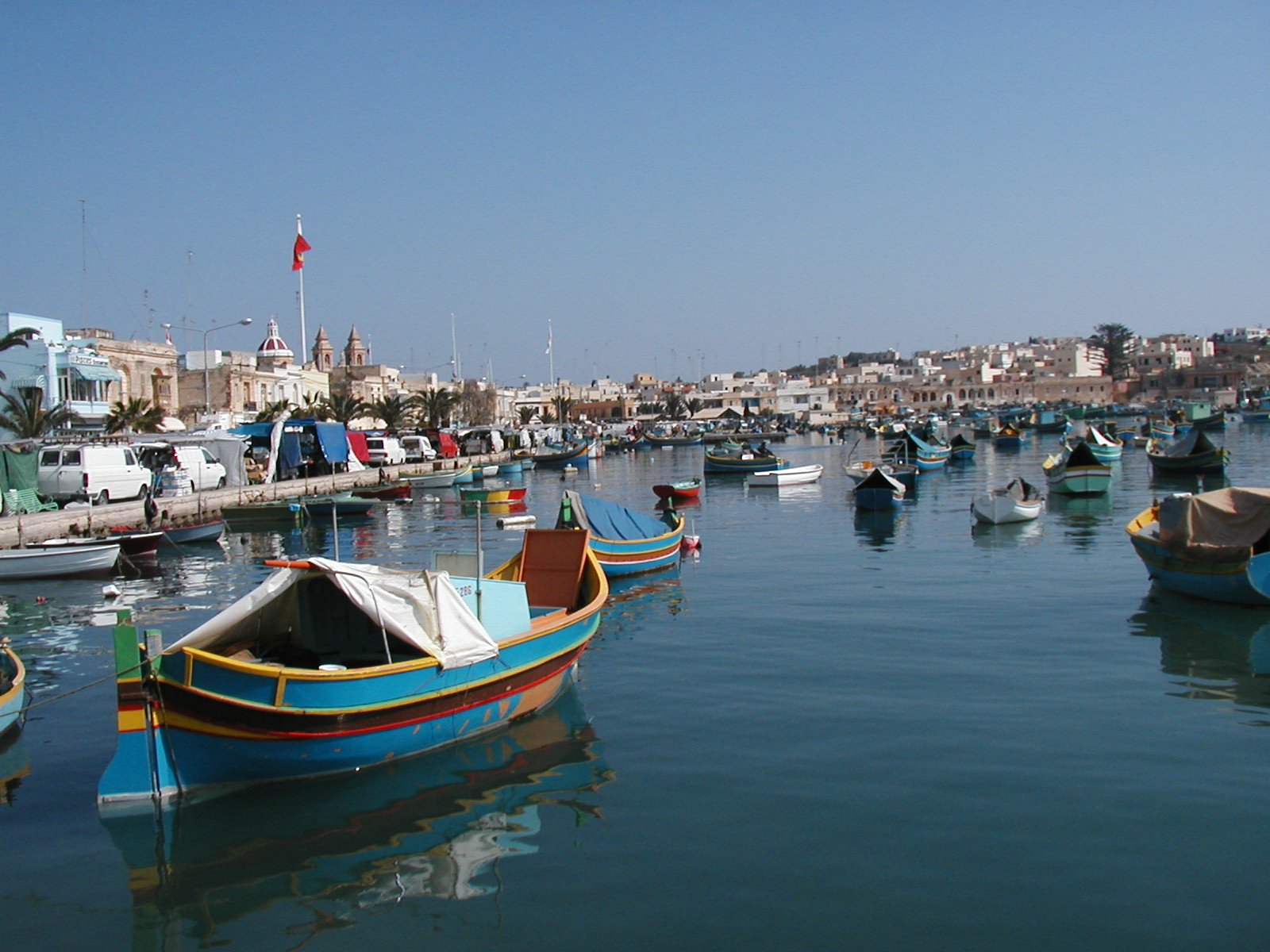 Port de Marsaxlokk / Marsaxlokk harbor, Malta